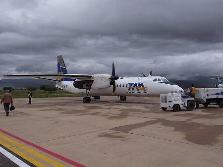 コチャバンバ空港で離陸を待つ西安MA-60。TAM航空（Transporte Aereo Militar）のコチャバンバ～スクレ間、MIL640便。